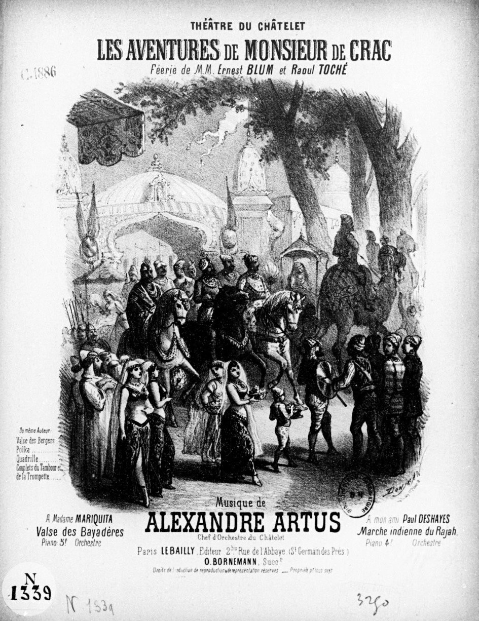 Les aventures de Monsieur de Crac : Marche indienne du Rajah (couverture)